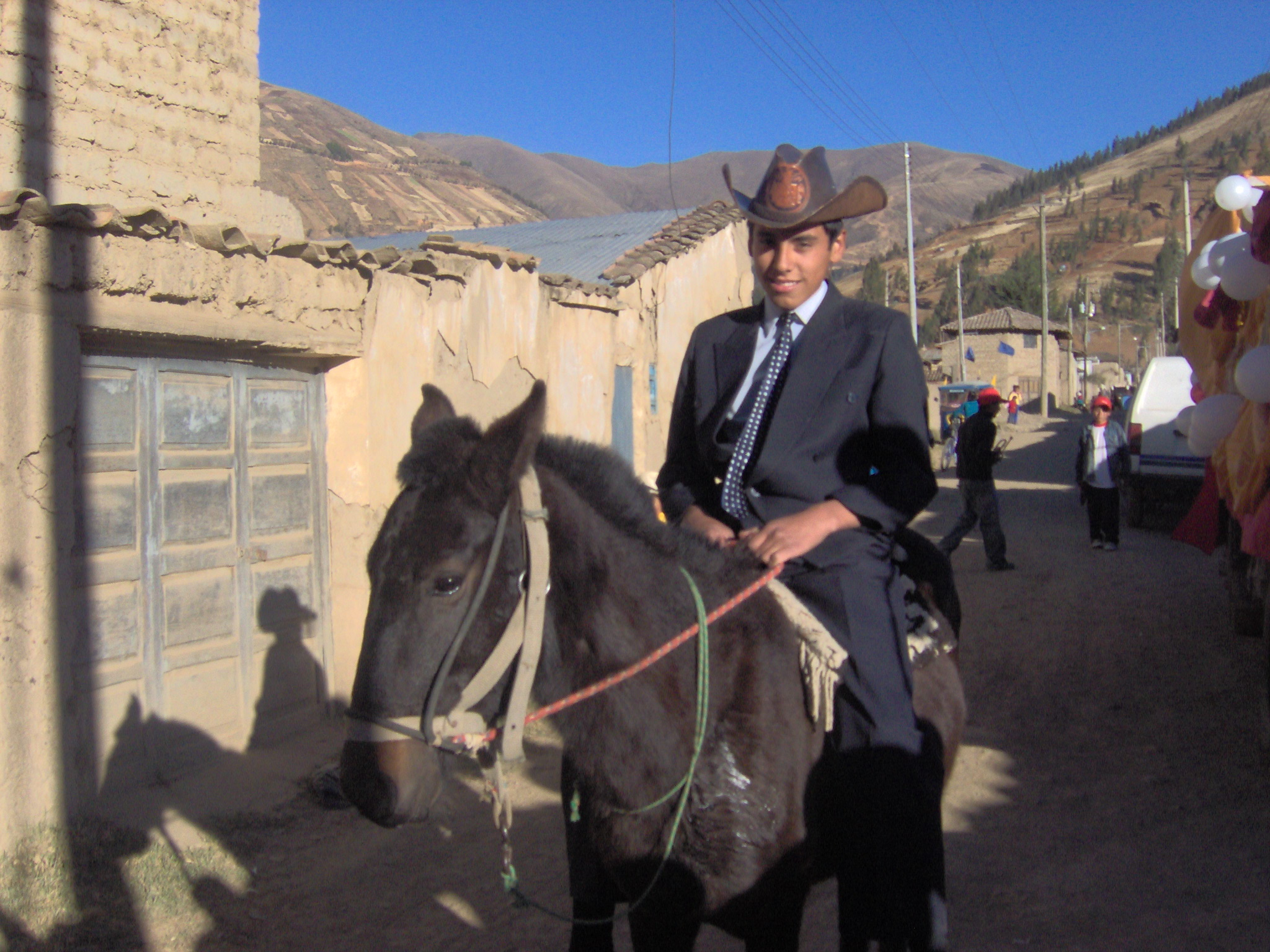 Pampino montando un caballo